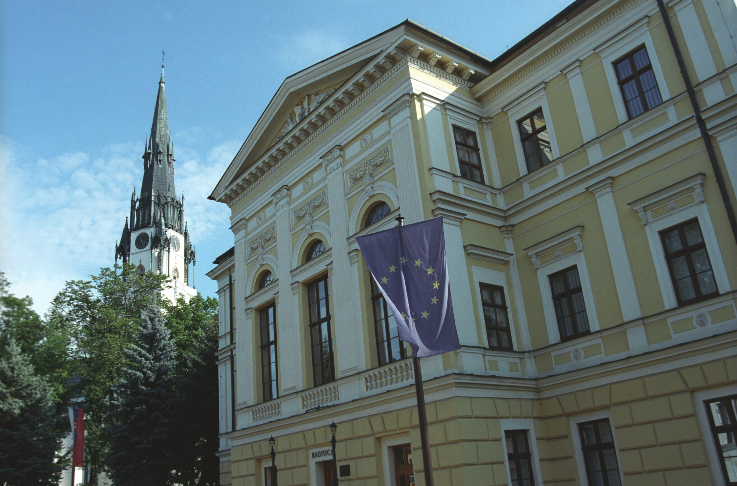 Spišská Nová Ves - radnica a kostol Nanebovzatia Panny Márie z 13. storočia